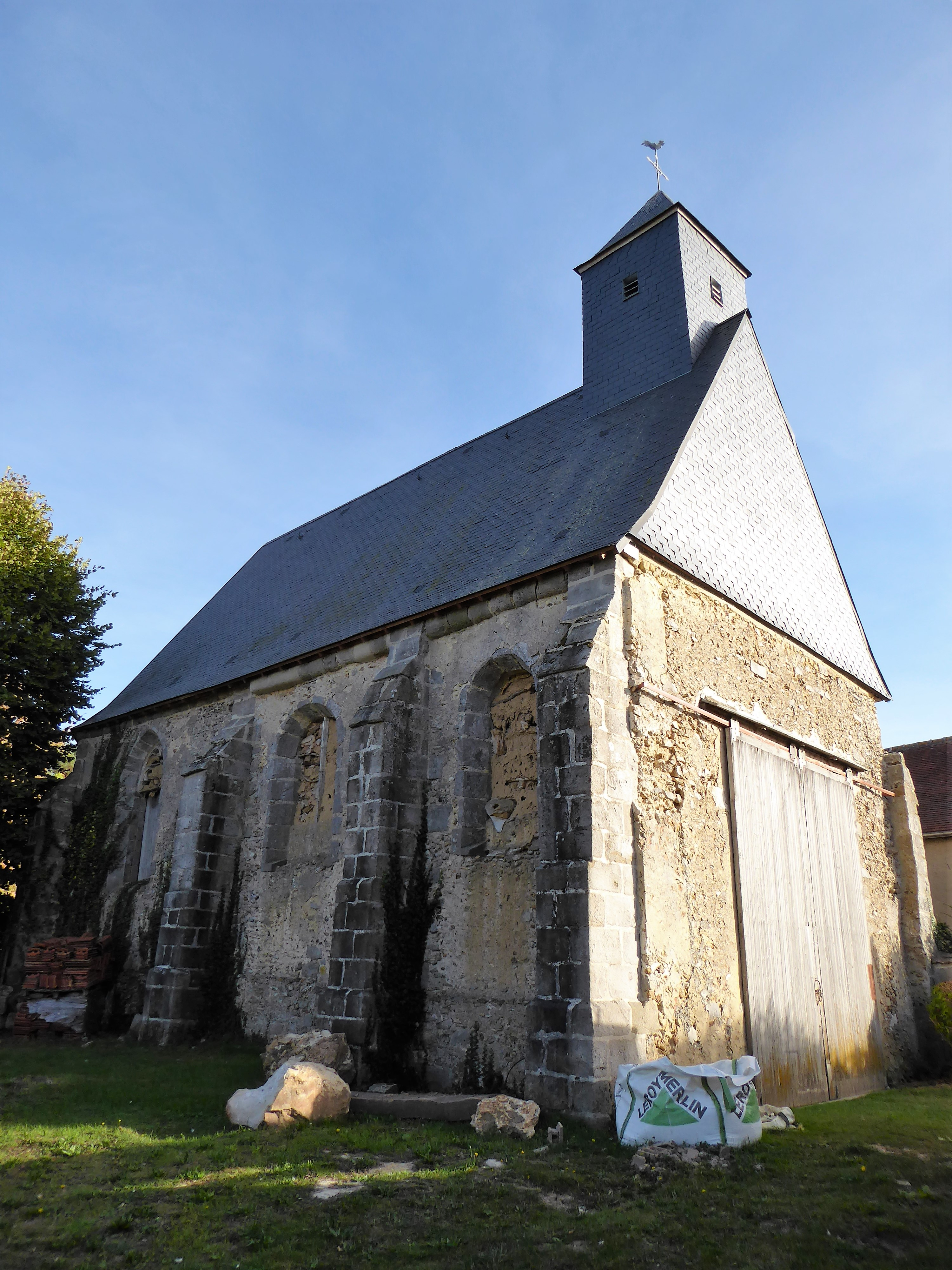 l'église Saint-Martin en 2018, les Pinthières, Eure-et-Loir, France.